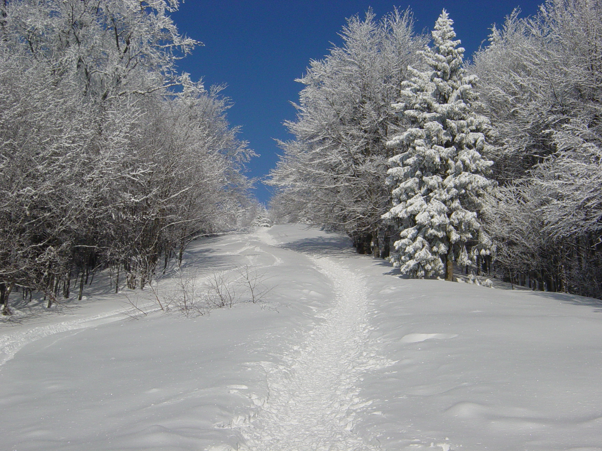 Klacianska Magura, Small Fatra, Slovakia, Winter 2006